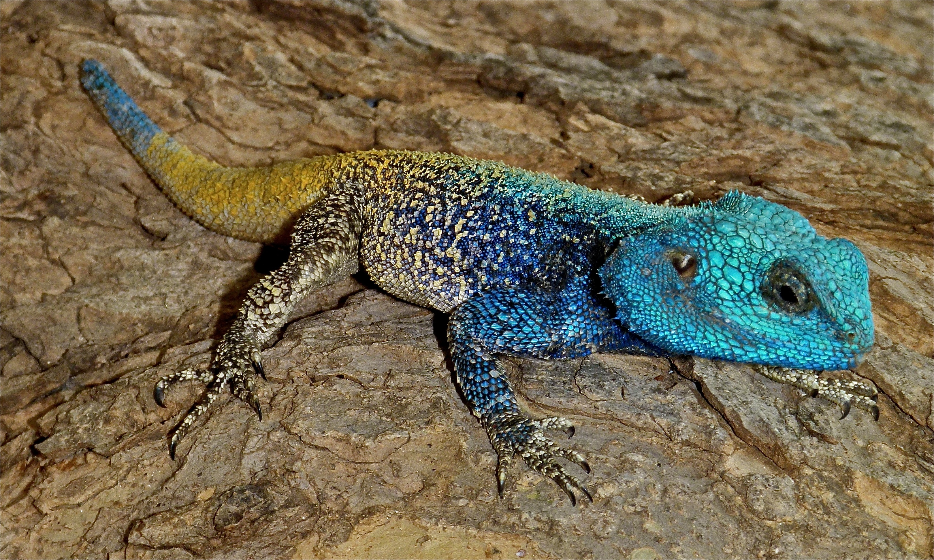 Skukuza Camp, Kruger NP, SOUTH AFRICA